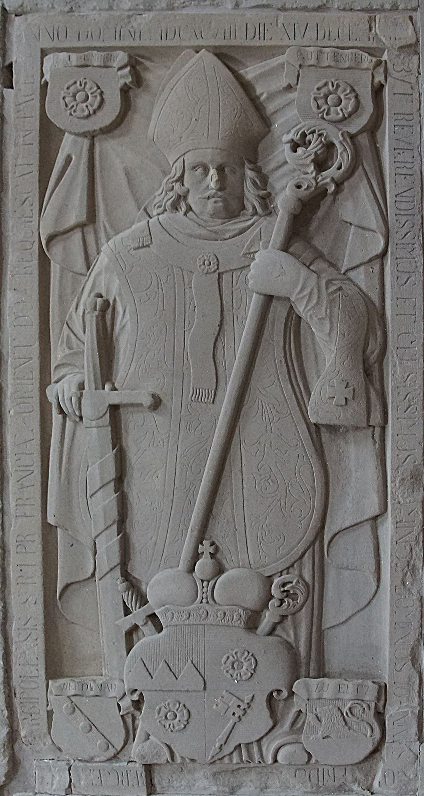 Grablege in der Marienkirche in der Festung Marienburg in Würzburg Johann Gottfried von Guttenberg (1684-1698)